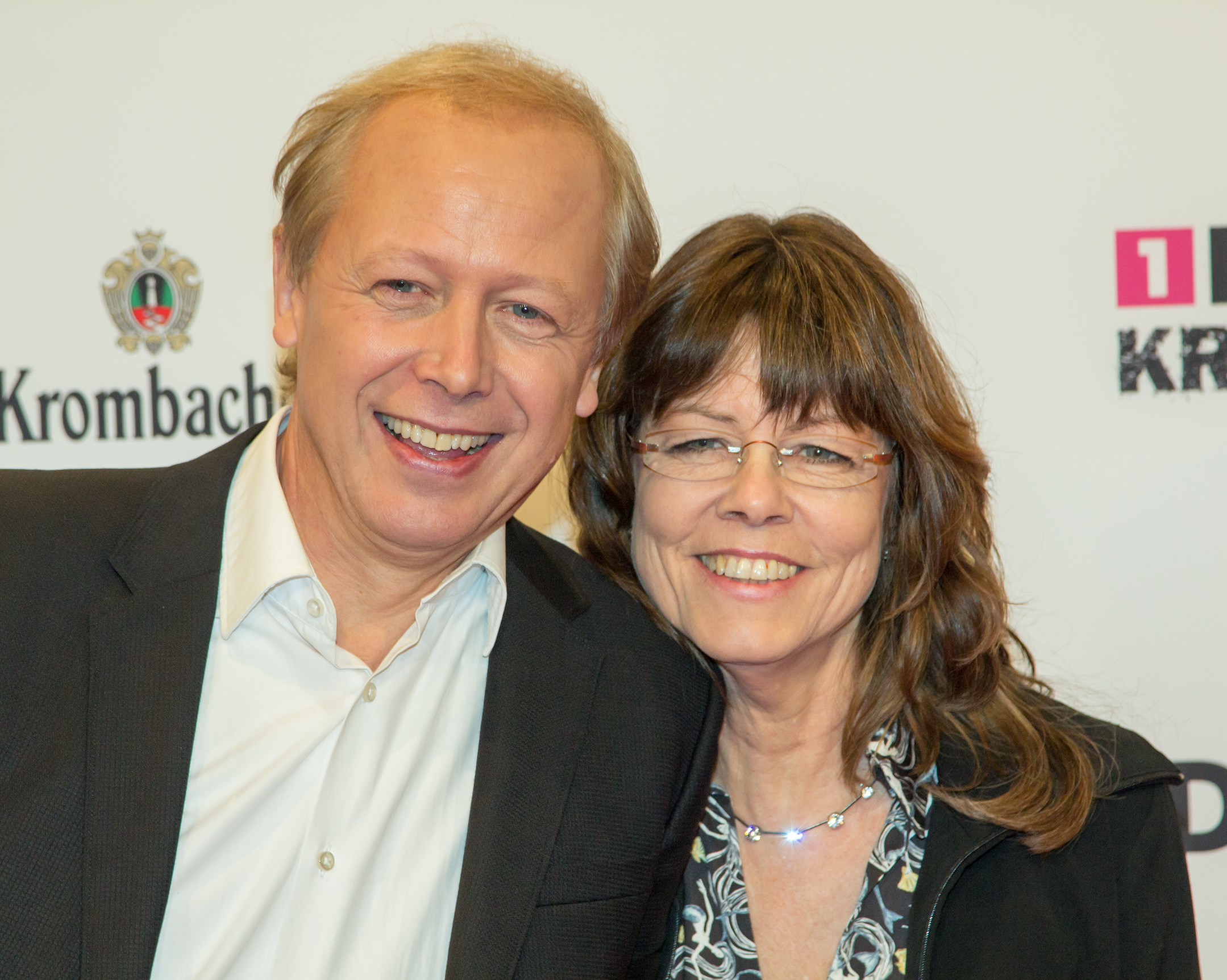 1LIVE Krone 2014 in der Bochumer Jahrhunderthalle: Tom Buhrow mit Sabine Stamer auf dem roten Teppich